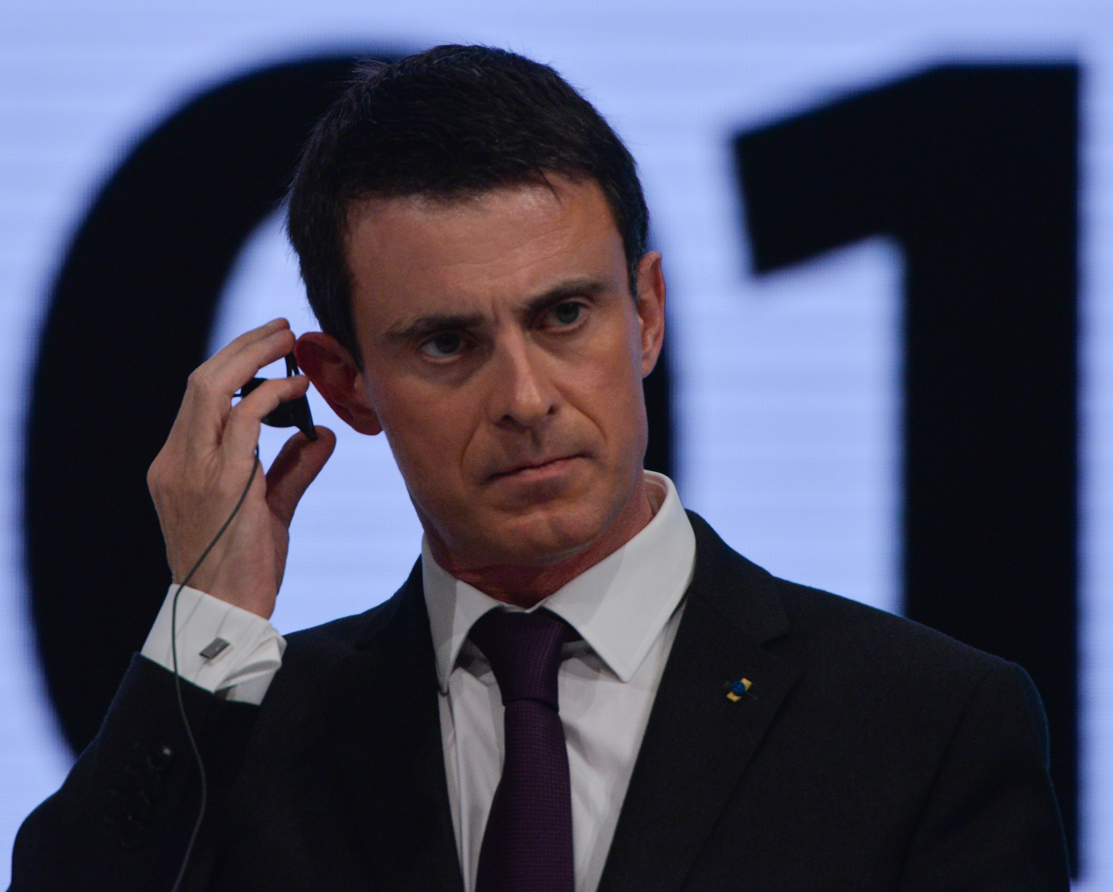 SPD Bundesparteitag Berlin, 10.-12. Dezember 2015, CityCube, Messe Berlin